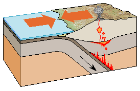 zona di subduzione subduction zone